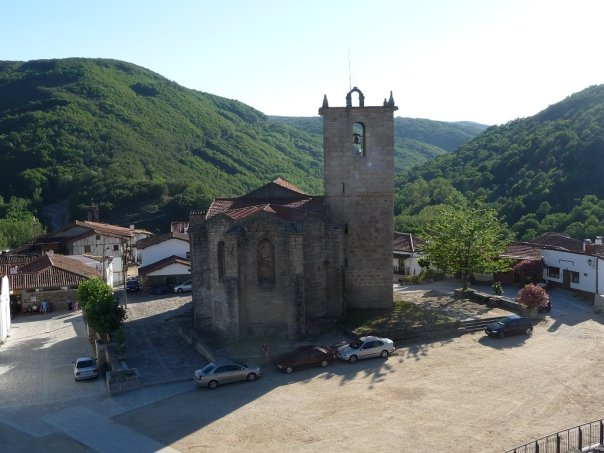 Semeya de la igresia